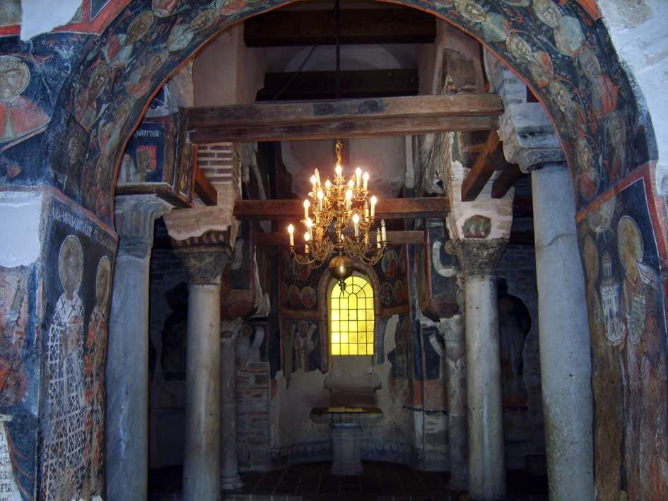 Църквата "Свети Петър и Павел", Търново-интериор